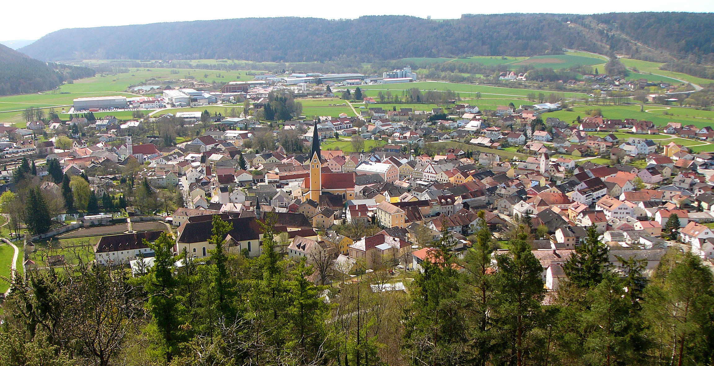 Gesamtanblick von Dietfurt an der Altmühl